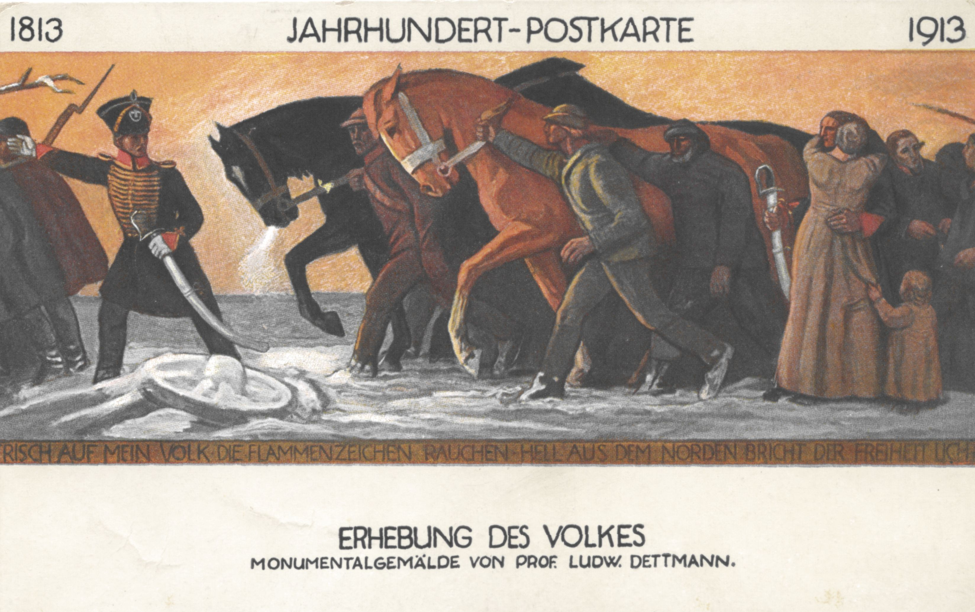 Monumentalgemälde "Erhebung des Volkes" von Ludwig Dettmann für die Kunstakademie Königsberg von 1913